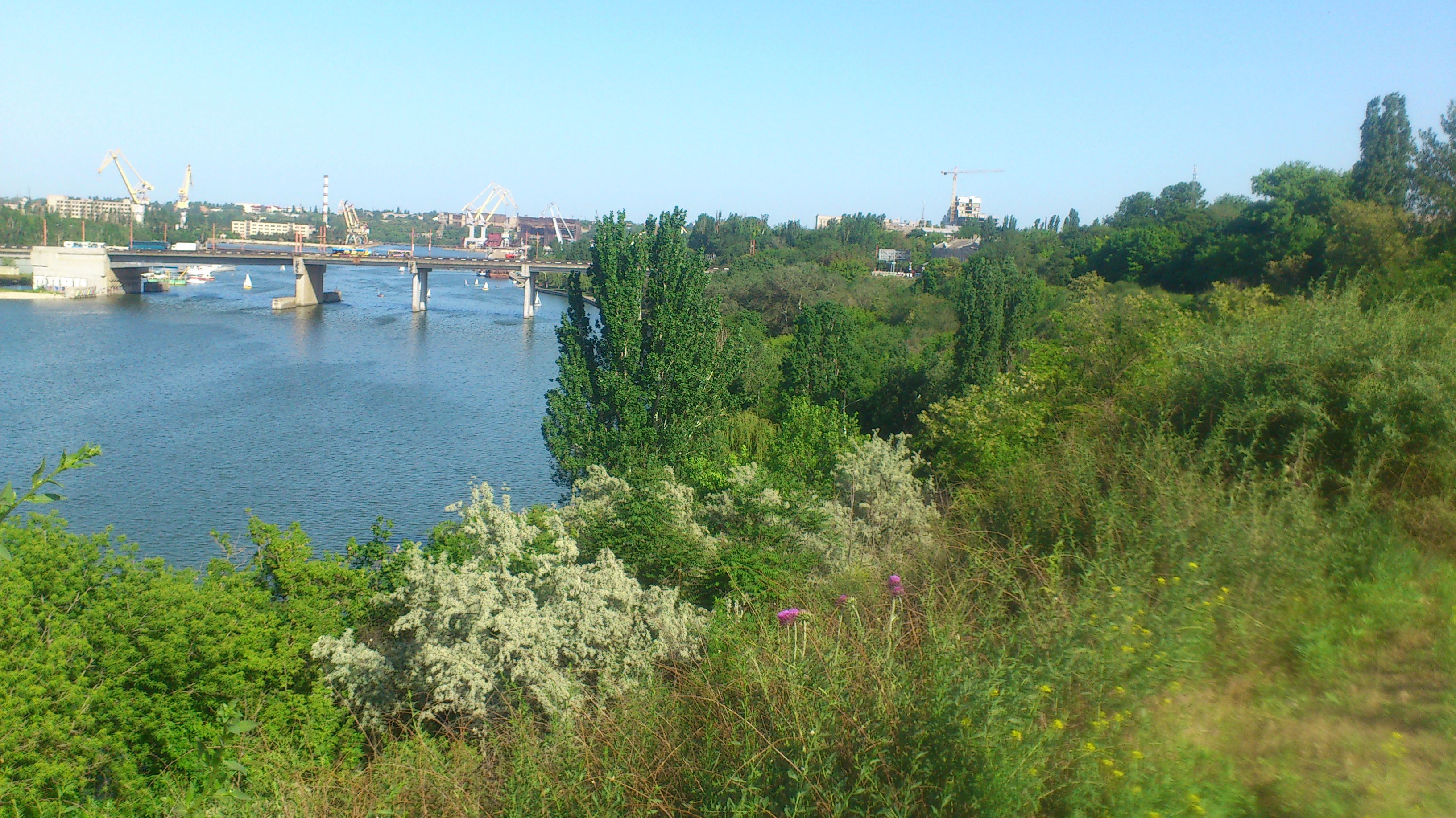 Інгульський міст з Дикого Саду